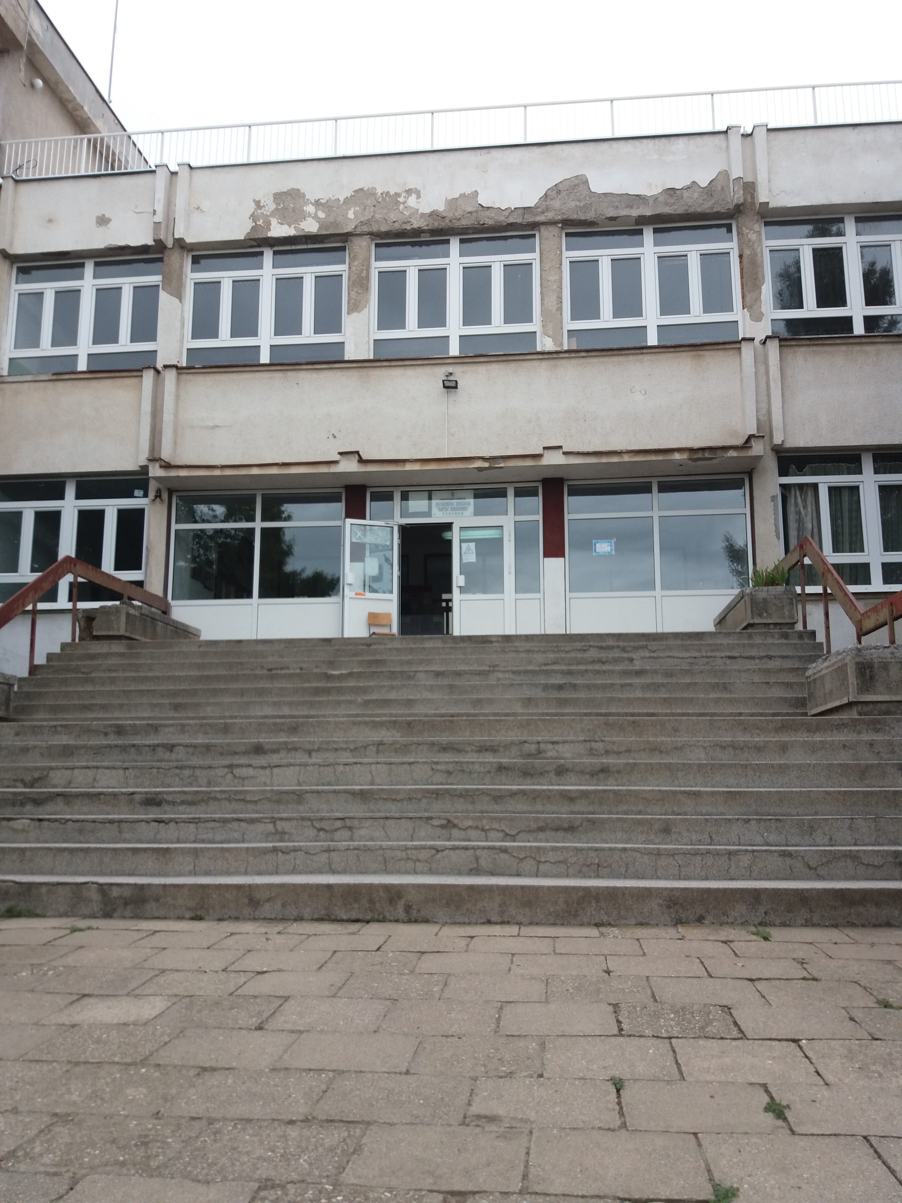 Srpski (latinica): Osnovna škola Đorđe Jovanović, Selevac